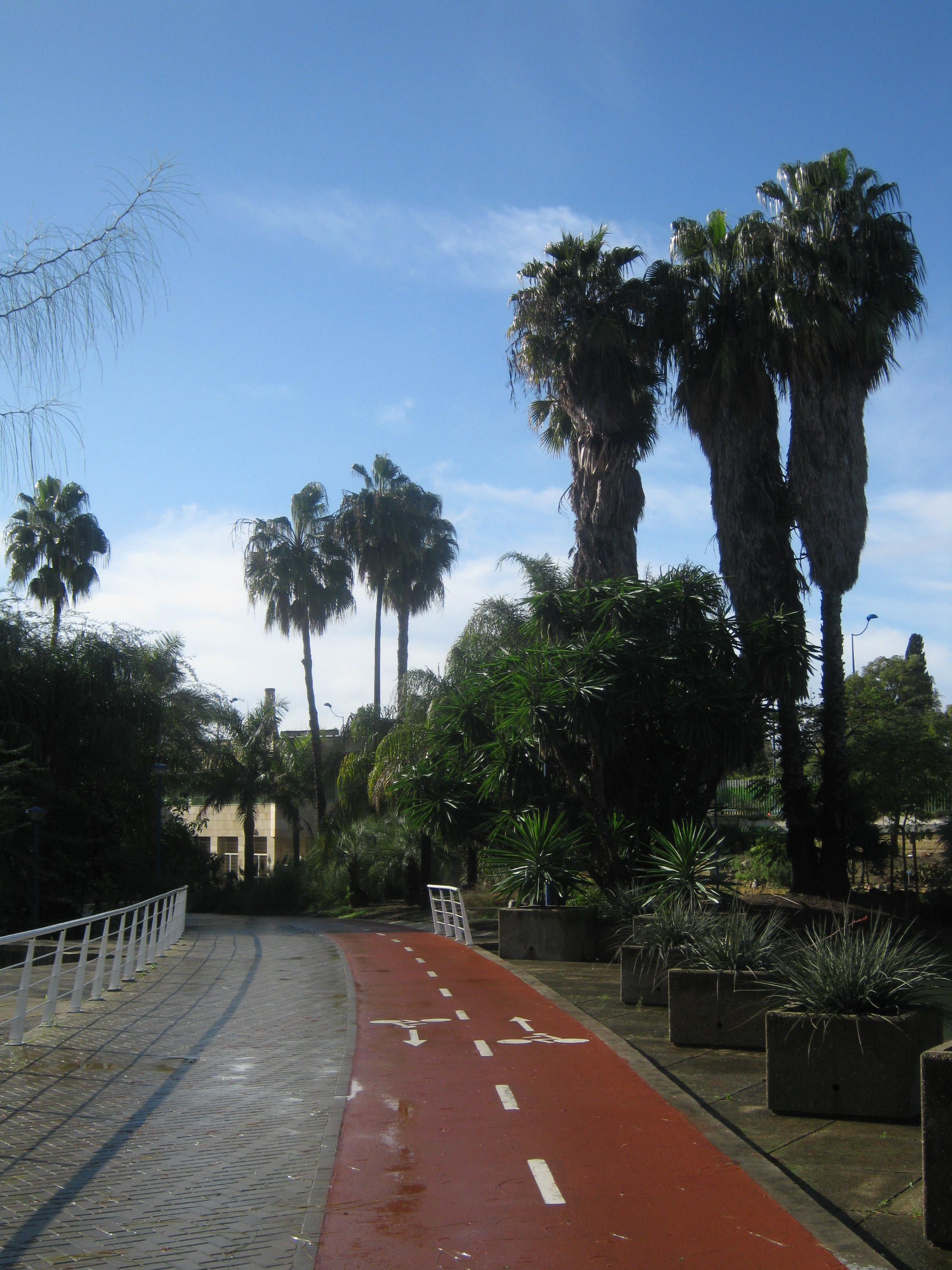 Carril bici a su paso por el Jardín Americano de Sevilla